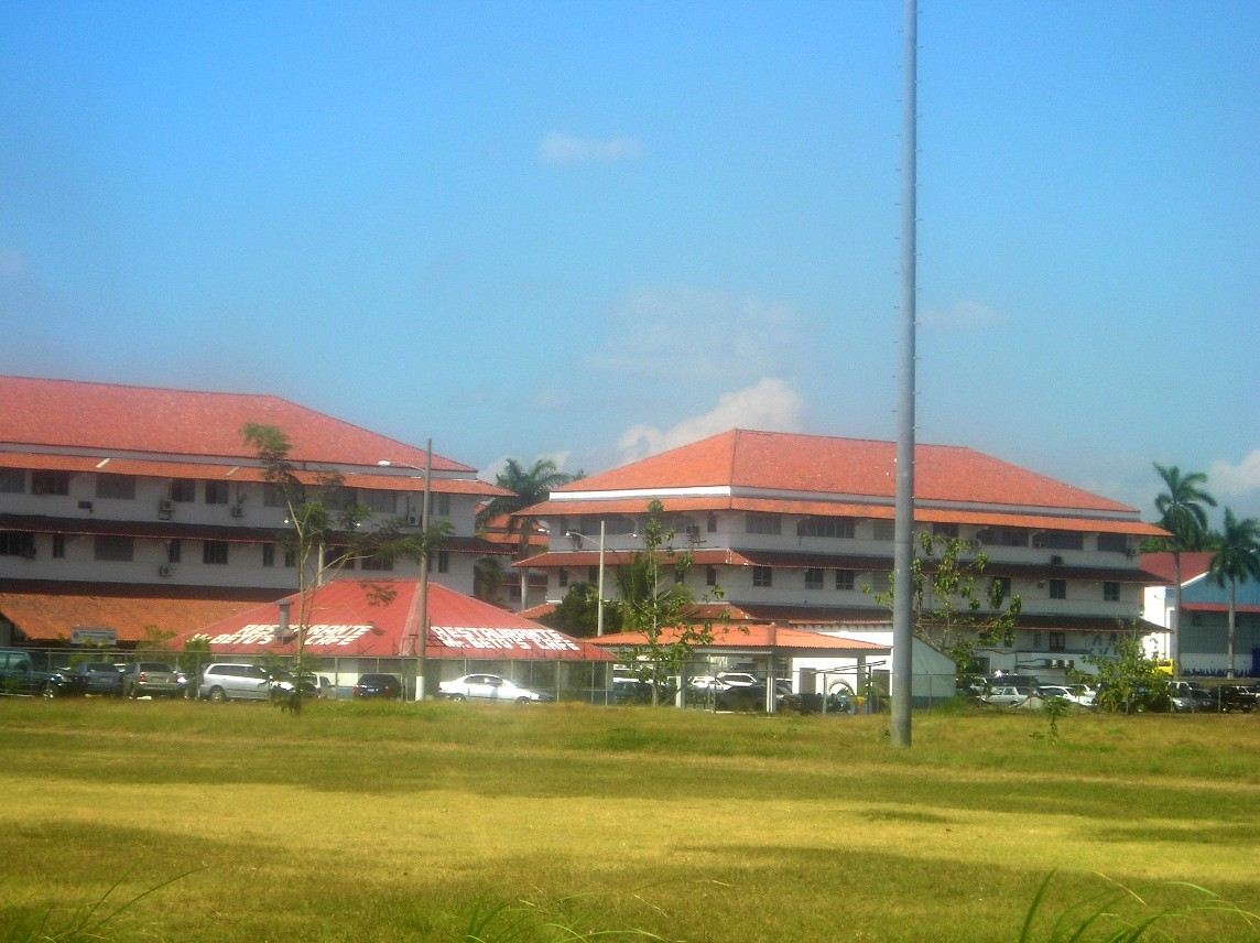 Panamá, Escuela de las Américas (edificios donde funcionó), 2006. Autor: Pepe Robles. Fecha: 7 de marzo 2006. Foto propia.